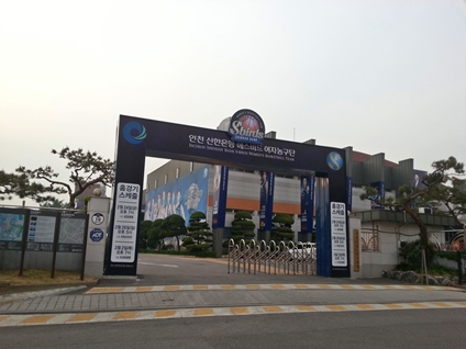 인천시립도원체육관 입구